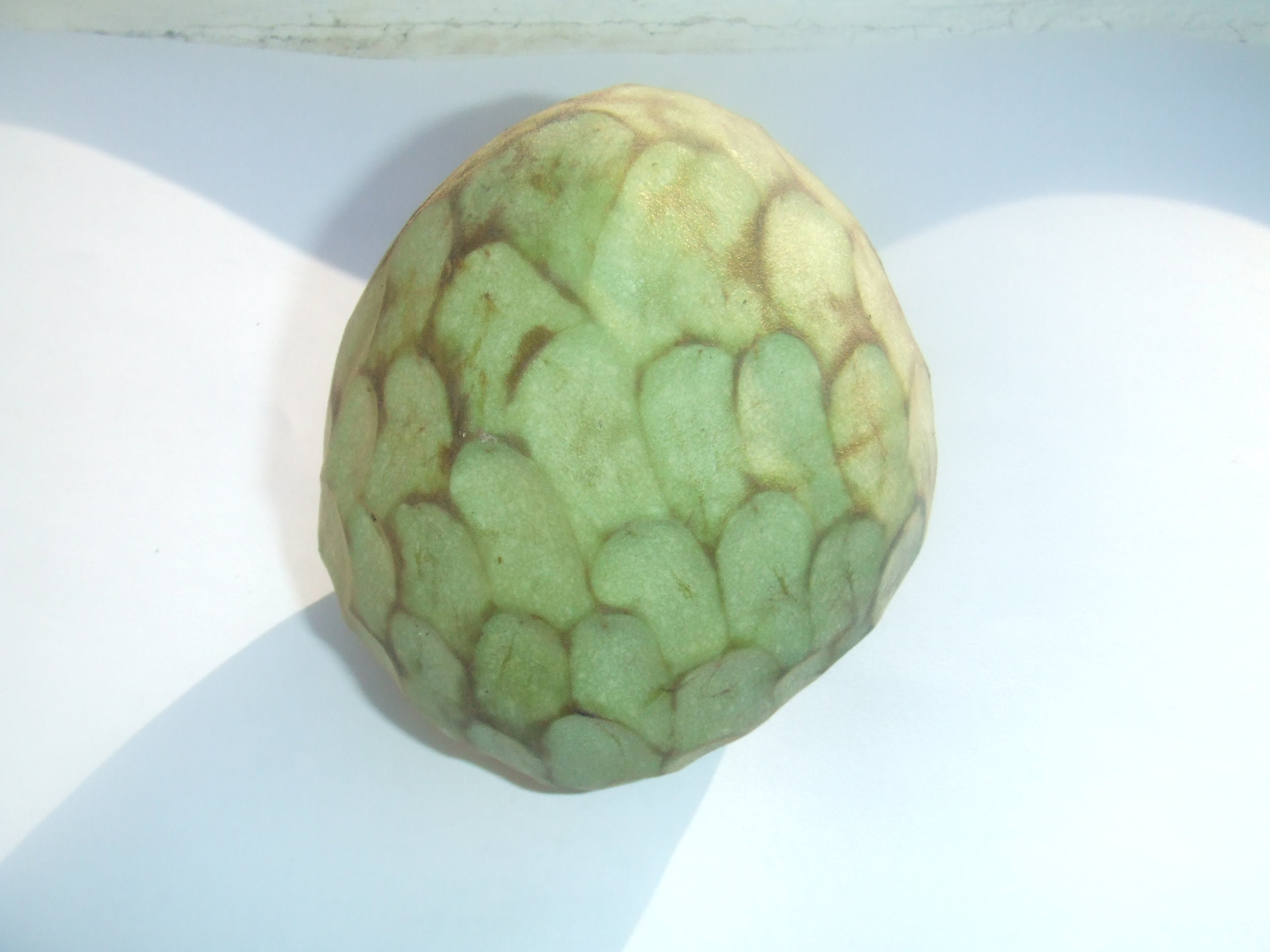 Cherimoya, gekocht op de markt op het Groot Visserijplein in Rotterdam